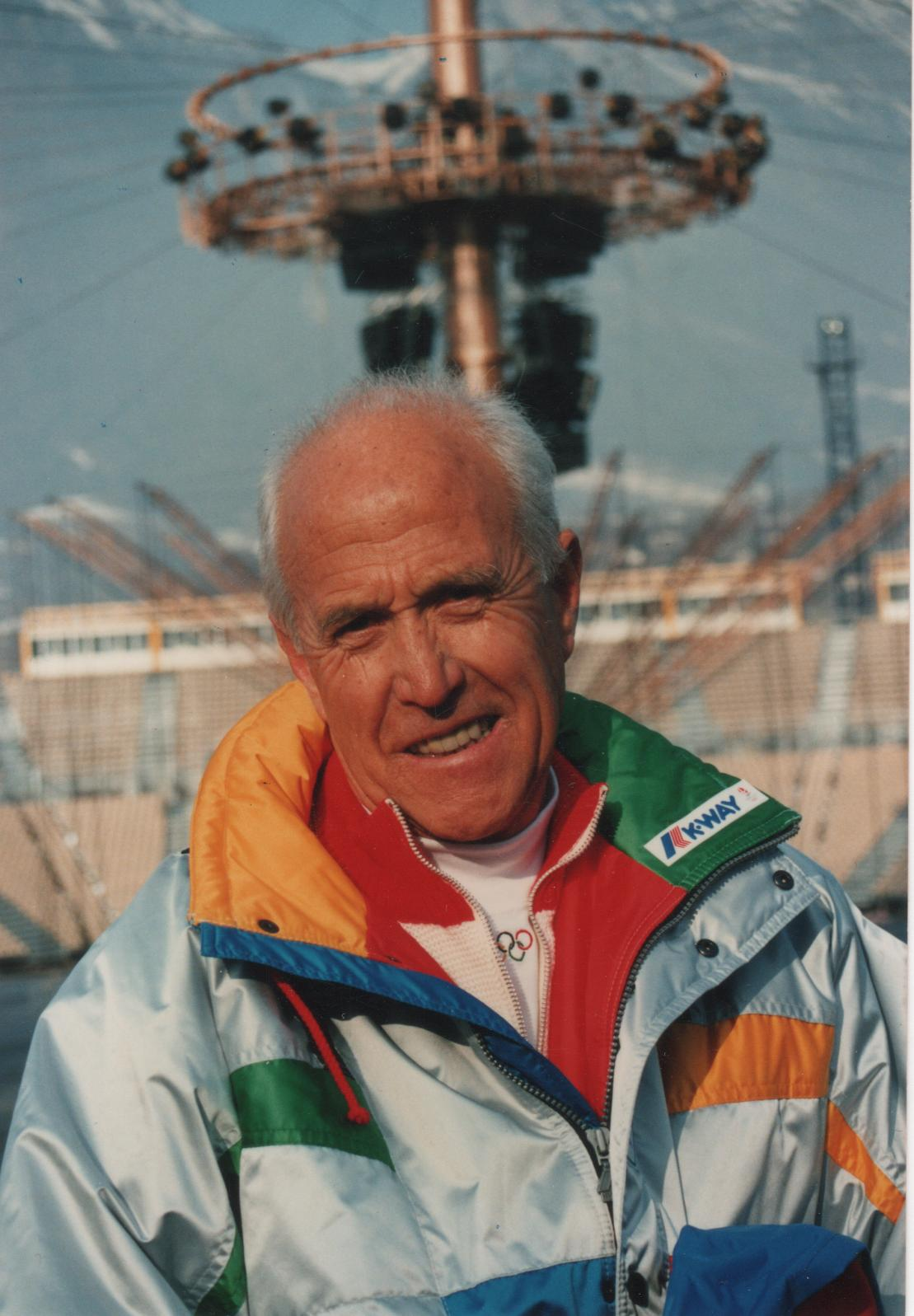 Claude Fayard lors de la couverture des Jeux Olympiques d'Arbertville 1992